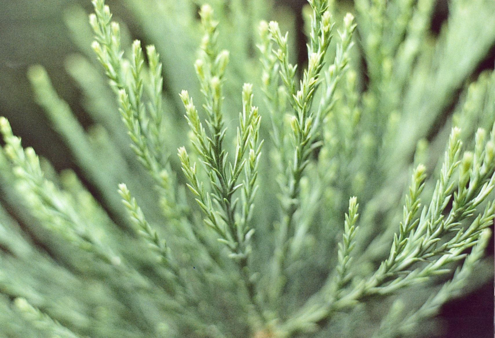 Sequoiadendron giganteum, leaves